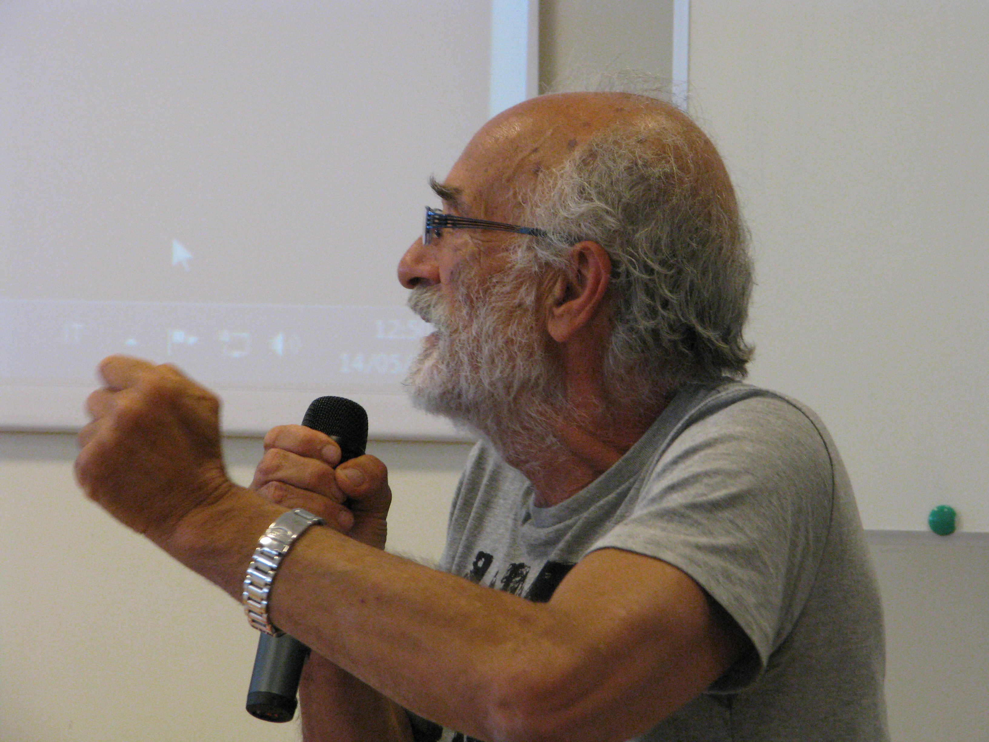 Marcello Baraghini. Foto di E.G.